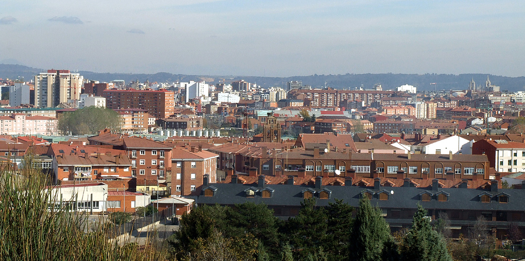 León desde Trobajo del Camino.